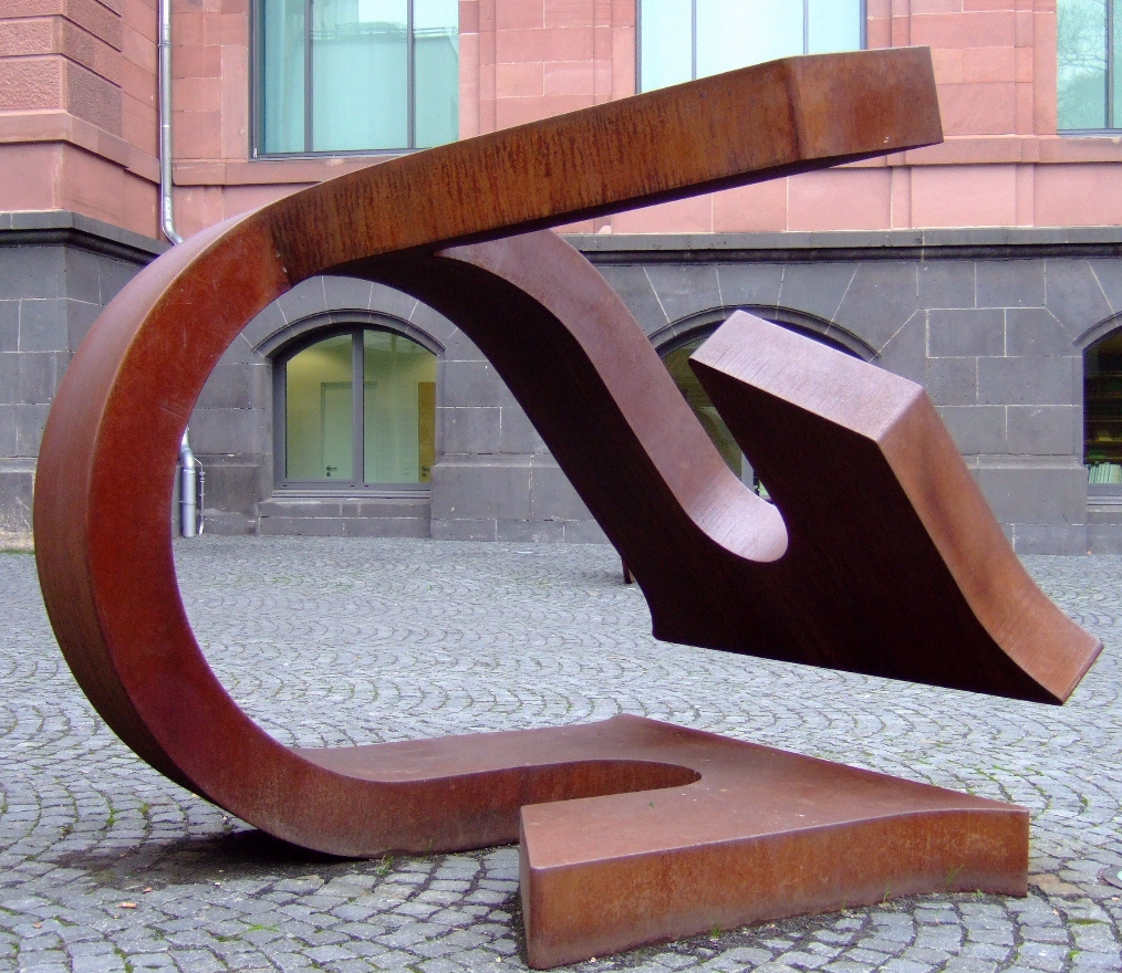 Reinhard G. Puch: Äon (1999) Material: Stahl Bonn – Rheinisches Landesmuseum (Außenbereich)